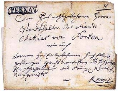 Письмо, отправленное из Пернова, погашенное домарочным штемпелем